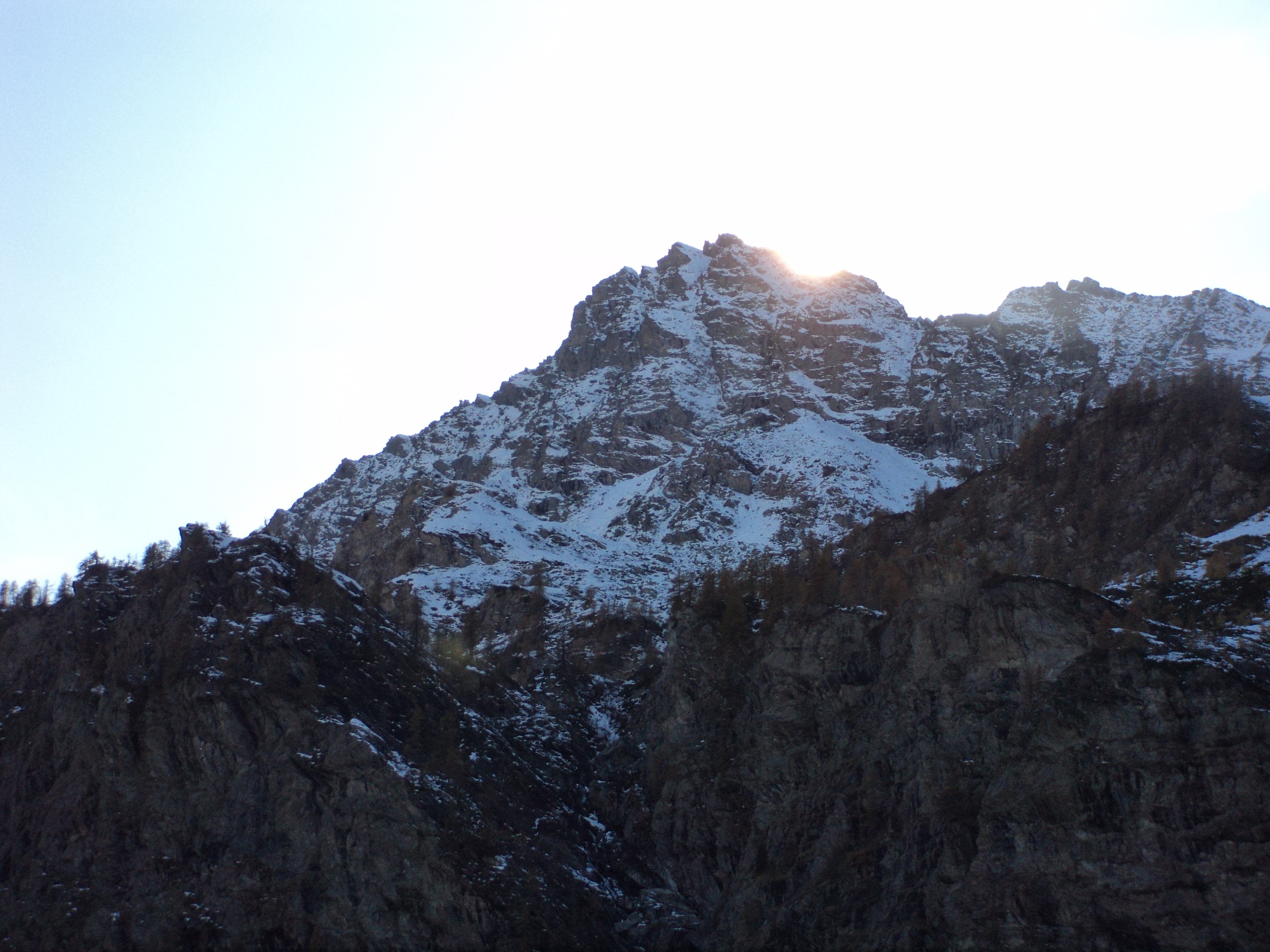 Il Monte Manzol visto dal rifugio Barbara al tramonto - Val Pellice - Provincia di Torino